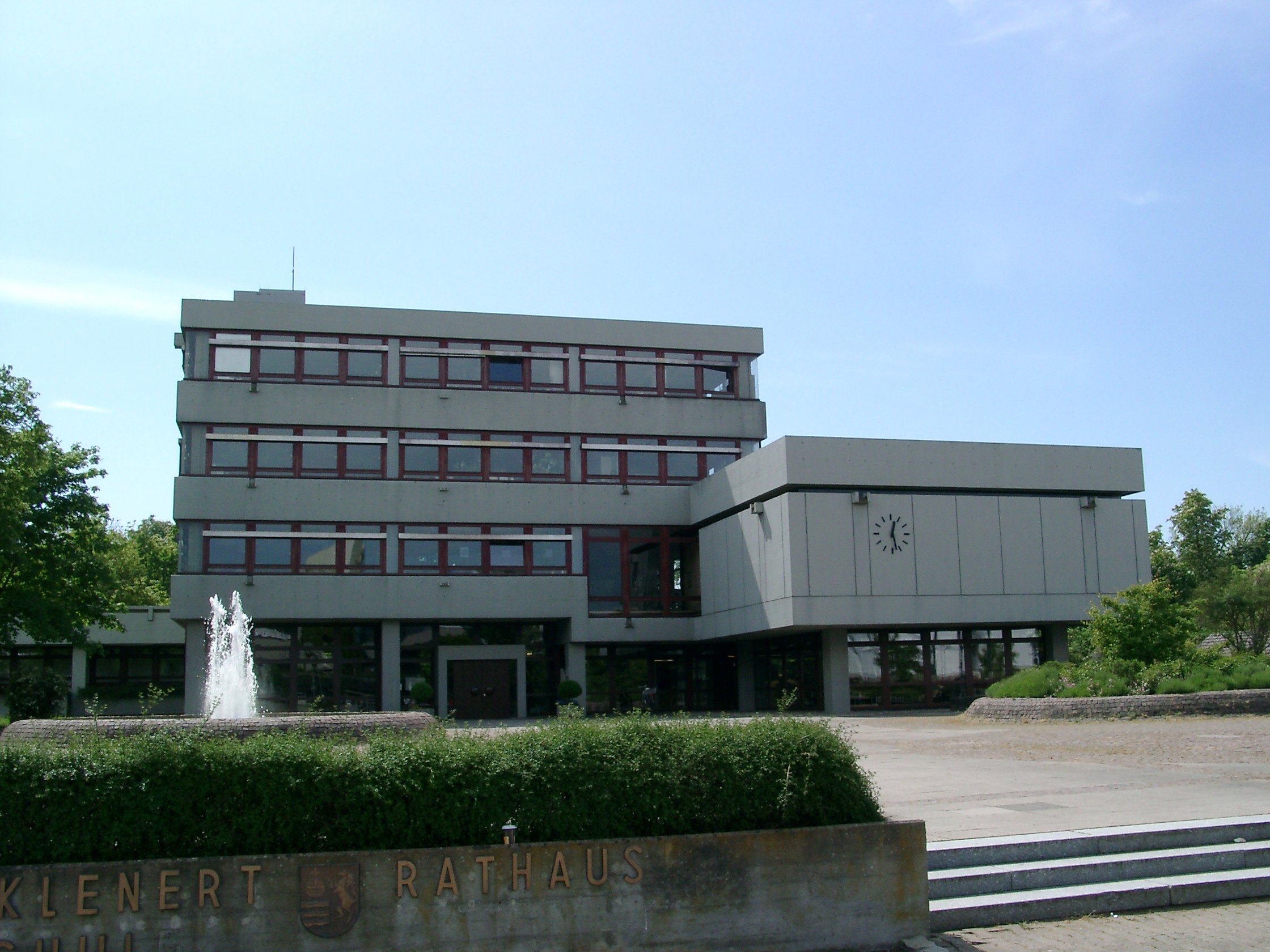 Bad Friedrichshall, Stadtteil Kochendorf, Rathaus